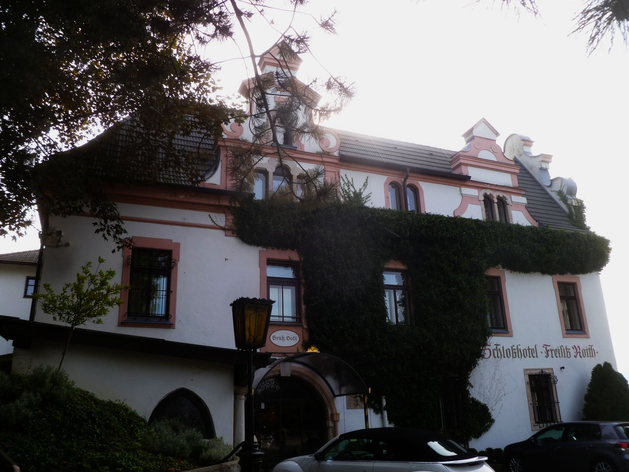 Gasthaus, Freisitz Roith